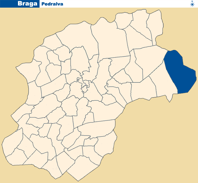 Localização de Pedralva no concelho de Braga.